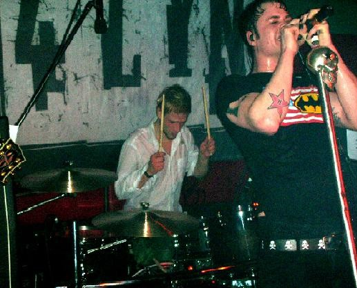 4Lyn bei einem Live Auftritt in Bremen (Compadres Tour)